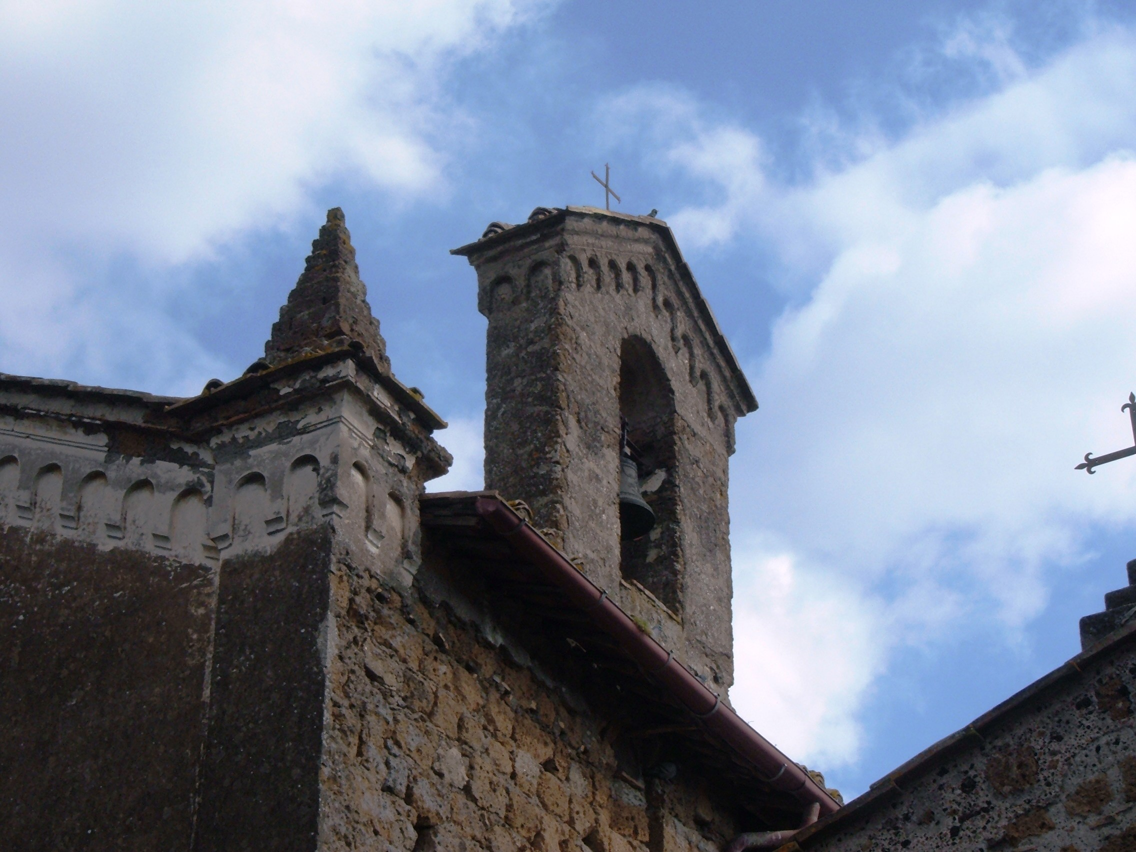 Campanile della chiesa della Madonna delle Grazie (Nepi)